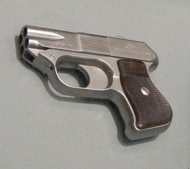 Un COP 357 Derringer. Photographié au "National Firearms Museum", le 14/04/2007.